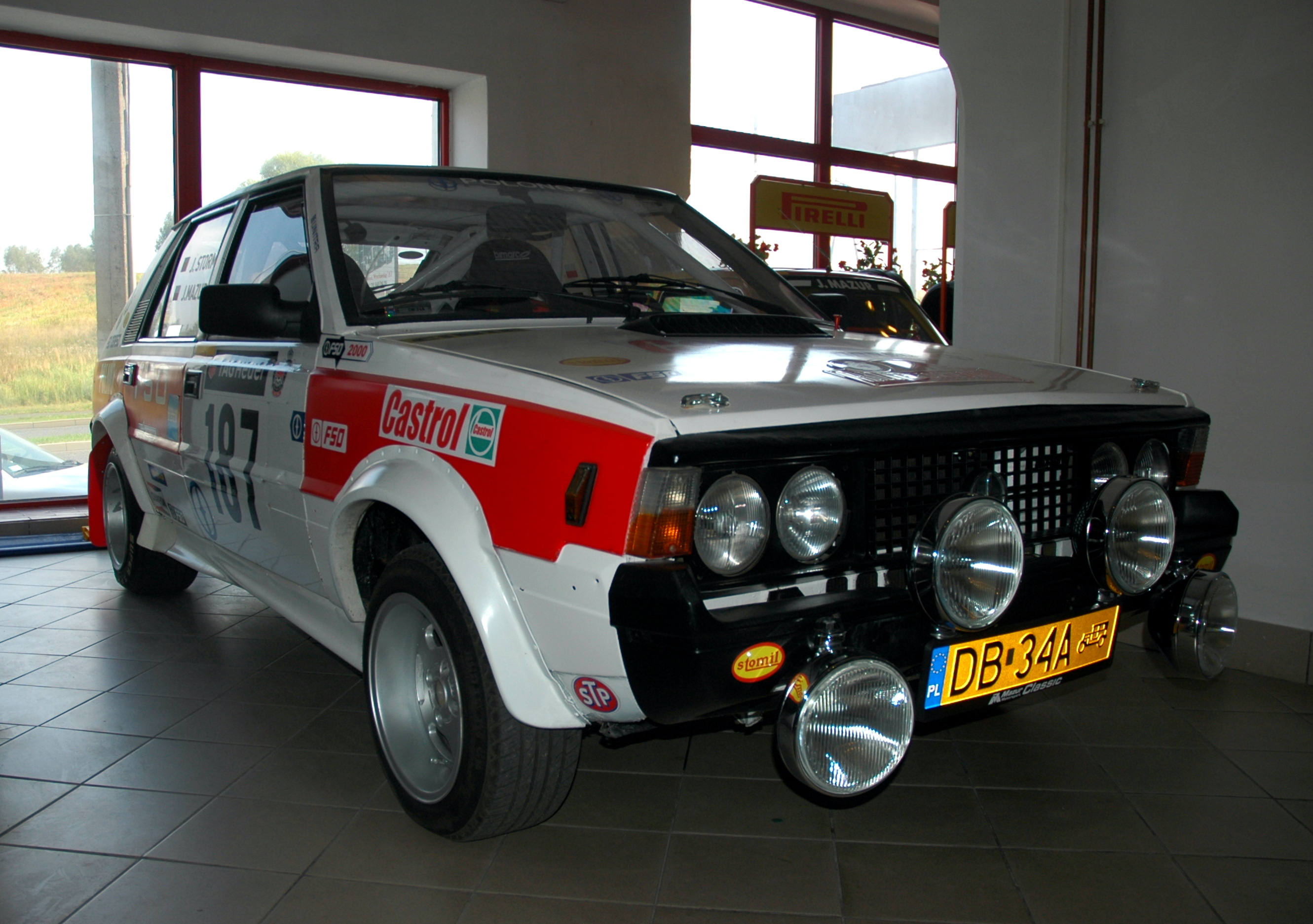 Muzeum Górnictwa i Sportów Motorowych w Wałbrzychu